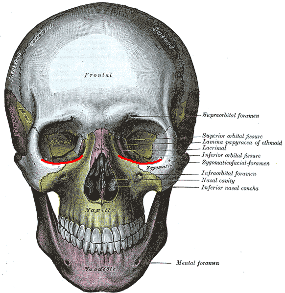 Infraorbital_margin